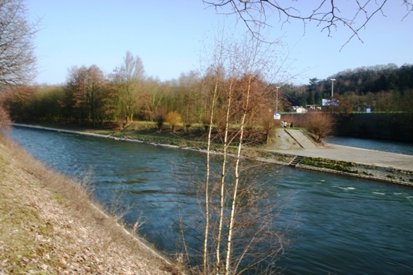 Schleis N° 3 oder Streupas Siicht an den ieweschte Schleisenkanal.